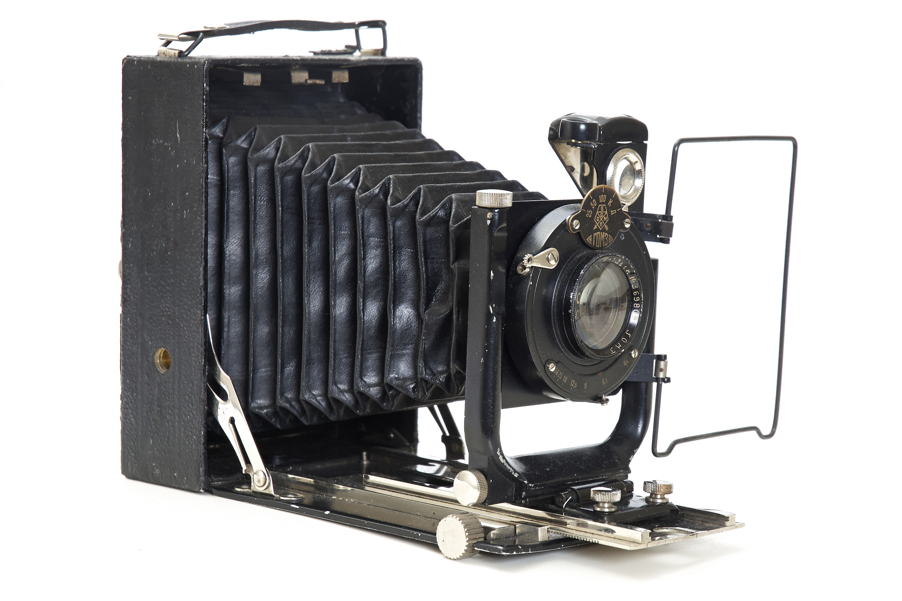 Fotocor N1. USSR camera.